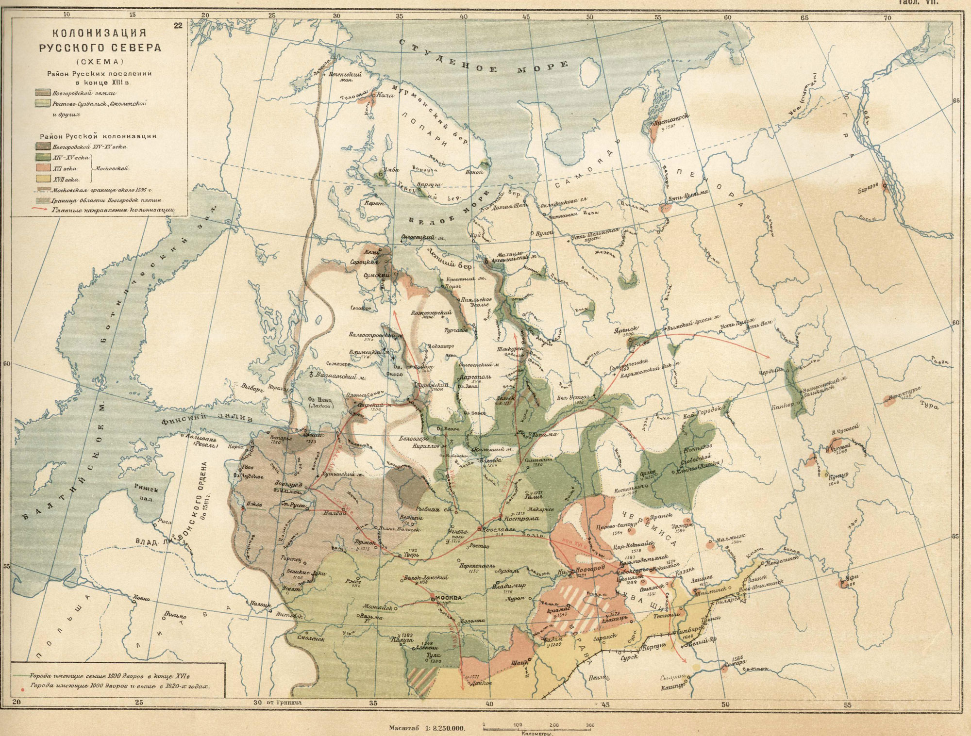 Колонизация русского Севера